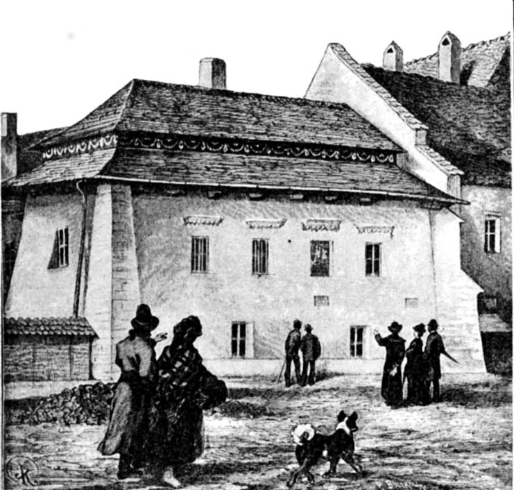 ilustracja z książki Zygmunta Glogera "Encyklopedia staropolska tom II" publikacja Wydawnictwa Piotra Laskauera i S-ki Warszawa 1901